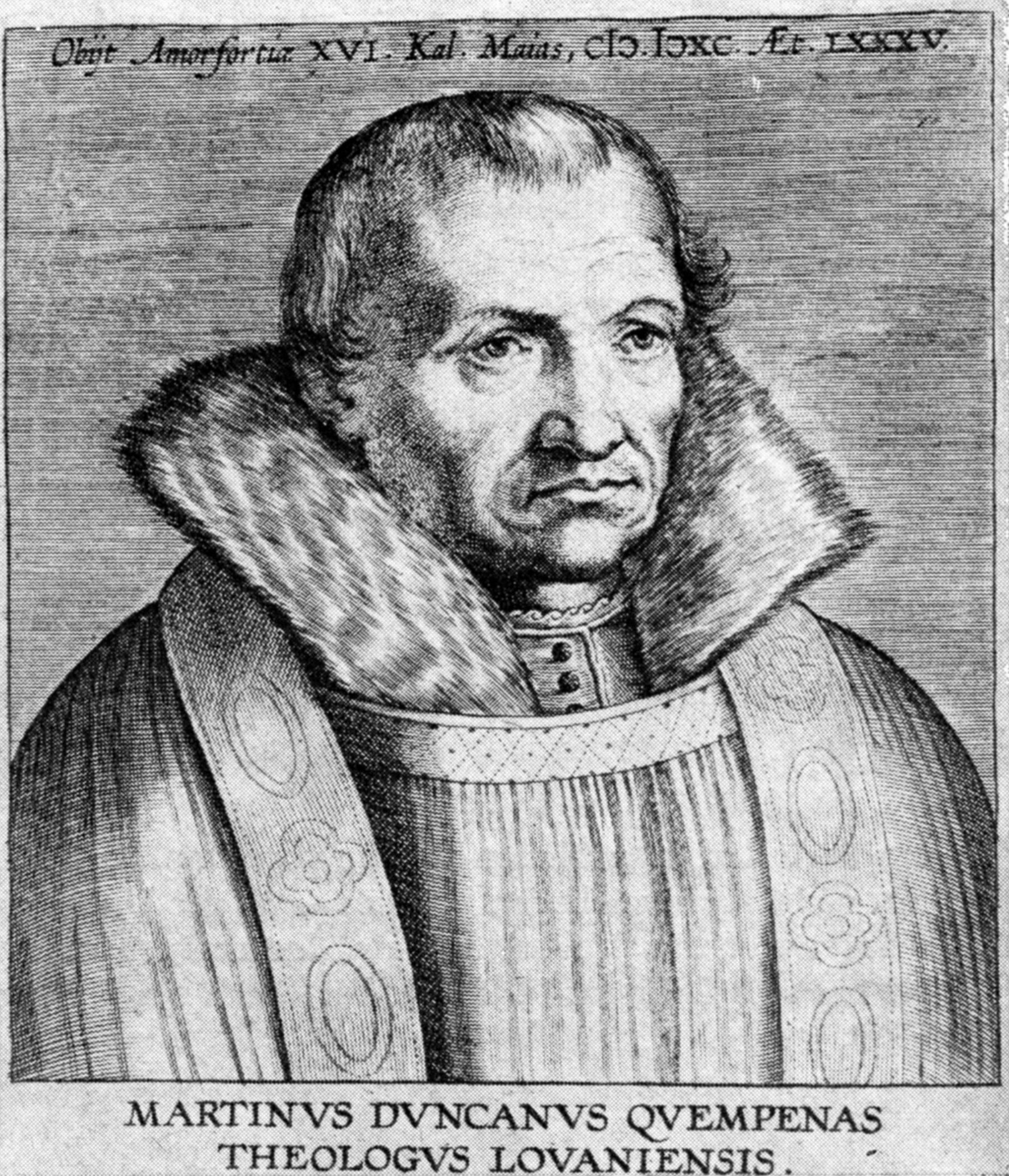 Martin Donk (1506-1590), Theologe. Holzschnitt.